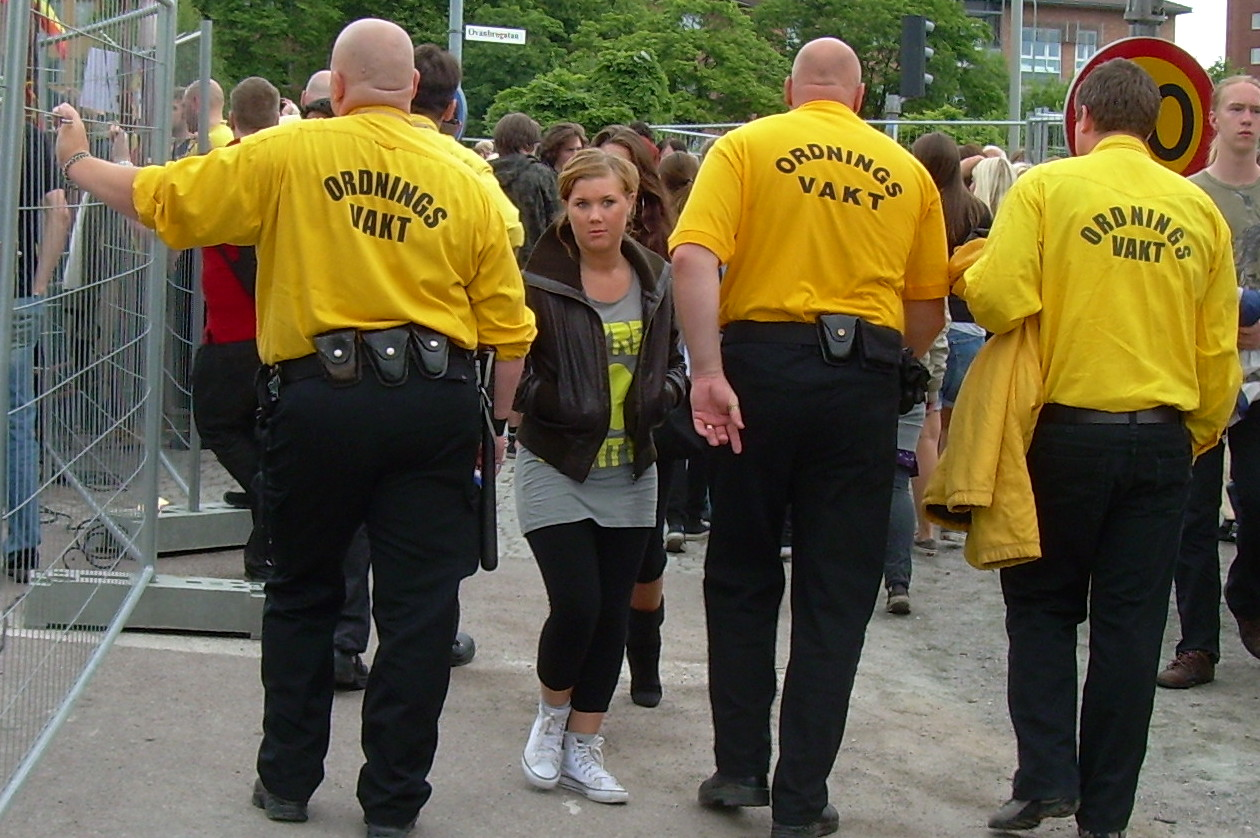 Ordningsvakter under Peace and Love i Borlänge 2007. Community Service Officers at Peace and Love in Borlänge 2007.